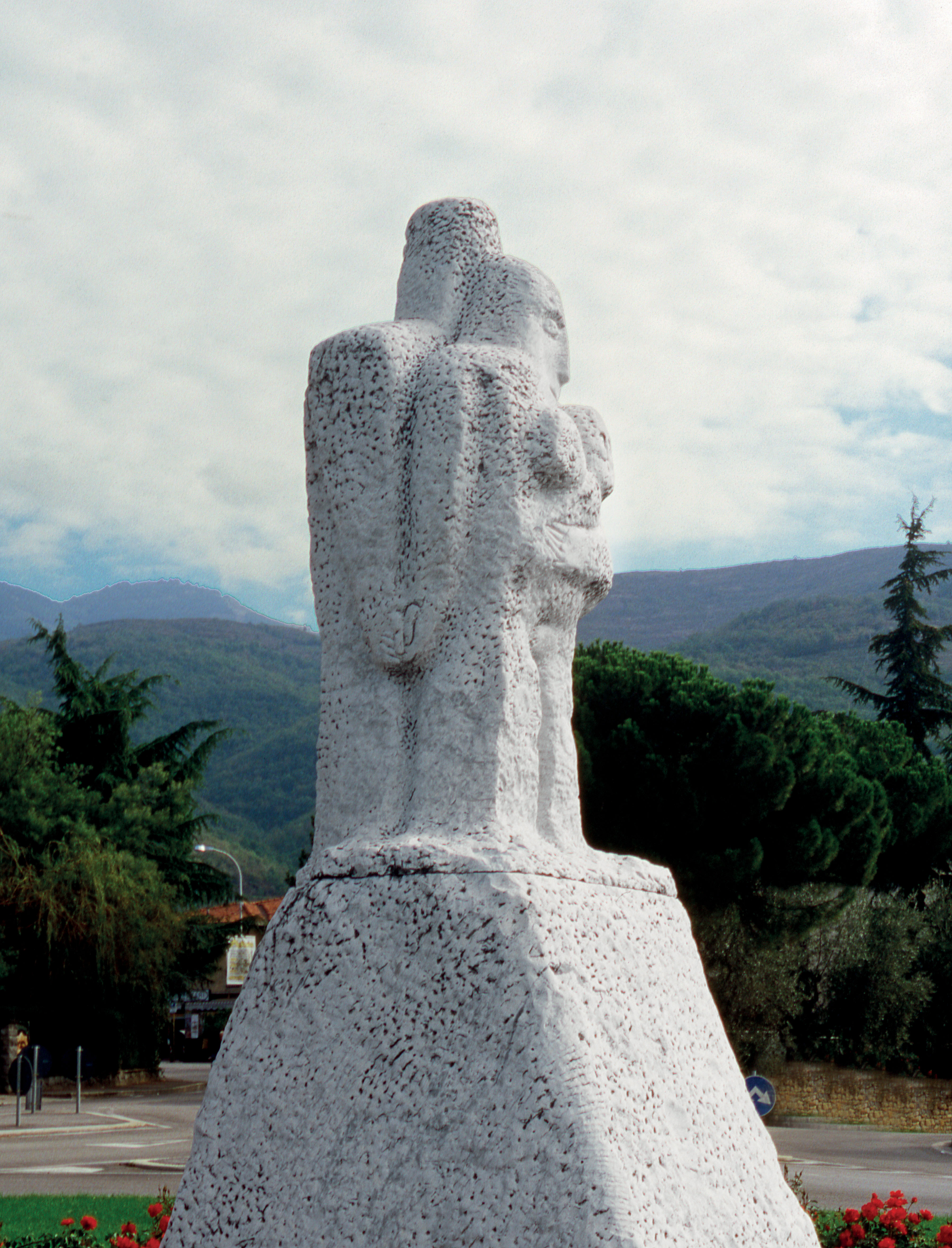 monumento